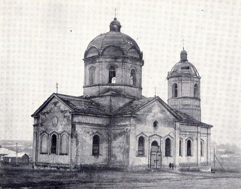 Большие Салы. Церковь Сурб Аствацацин